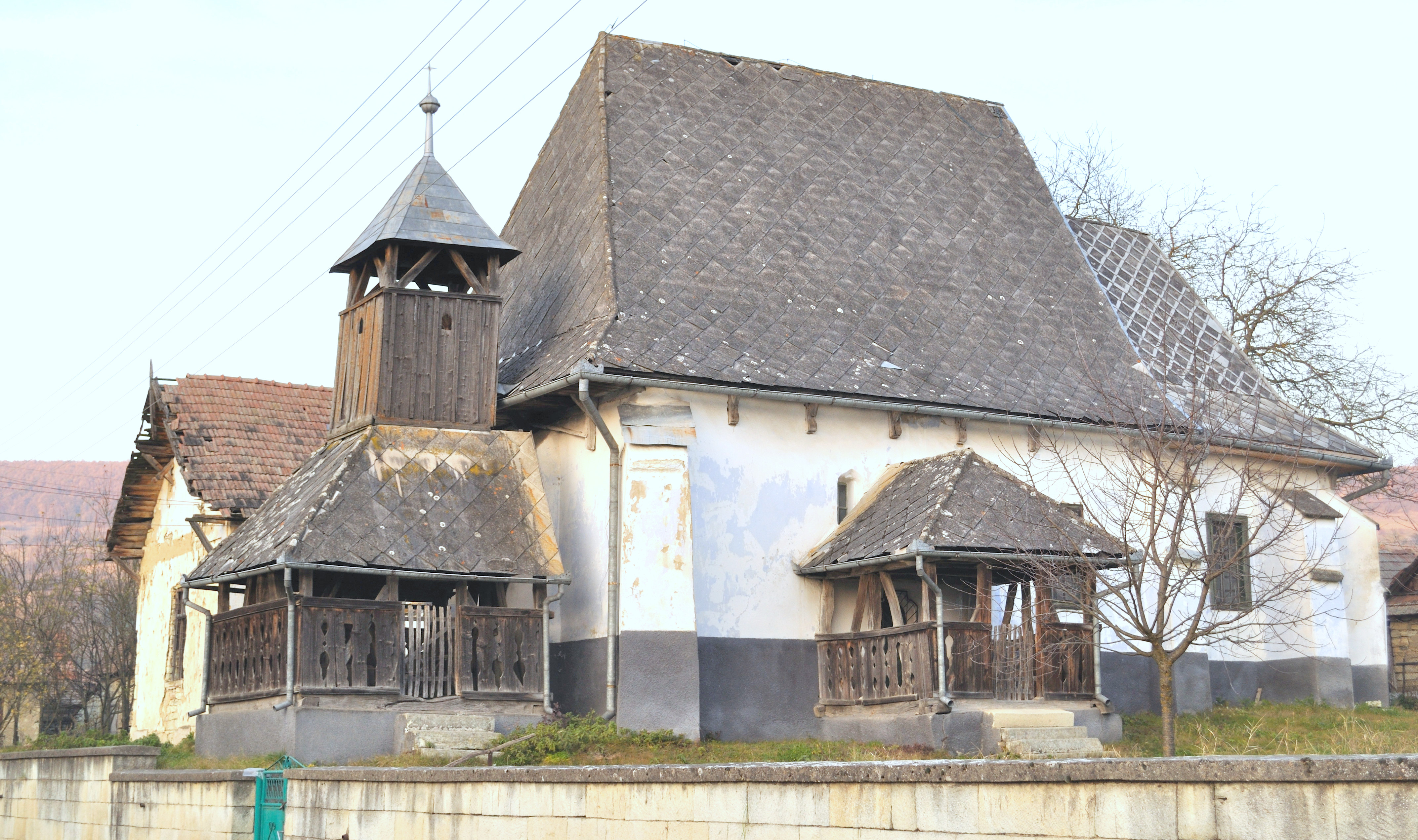 Református templom, Alsótők